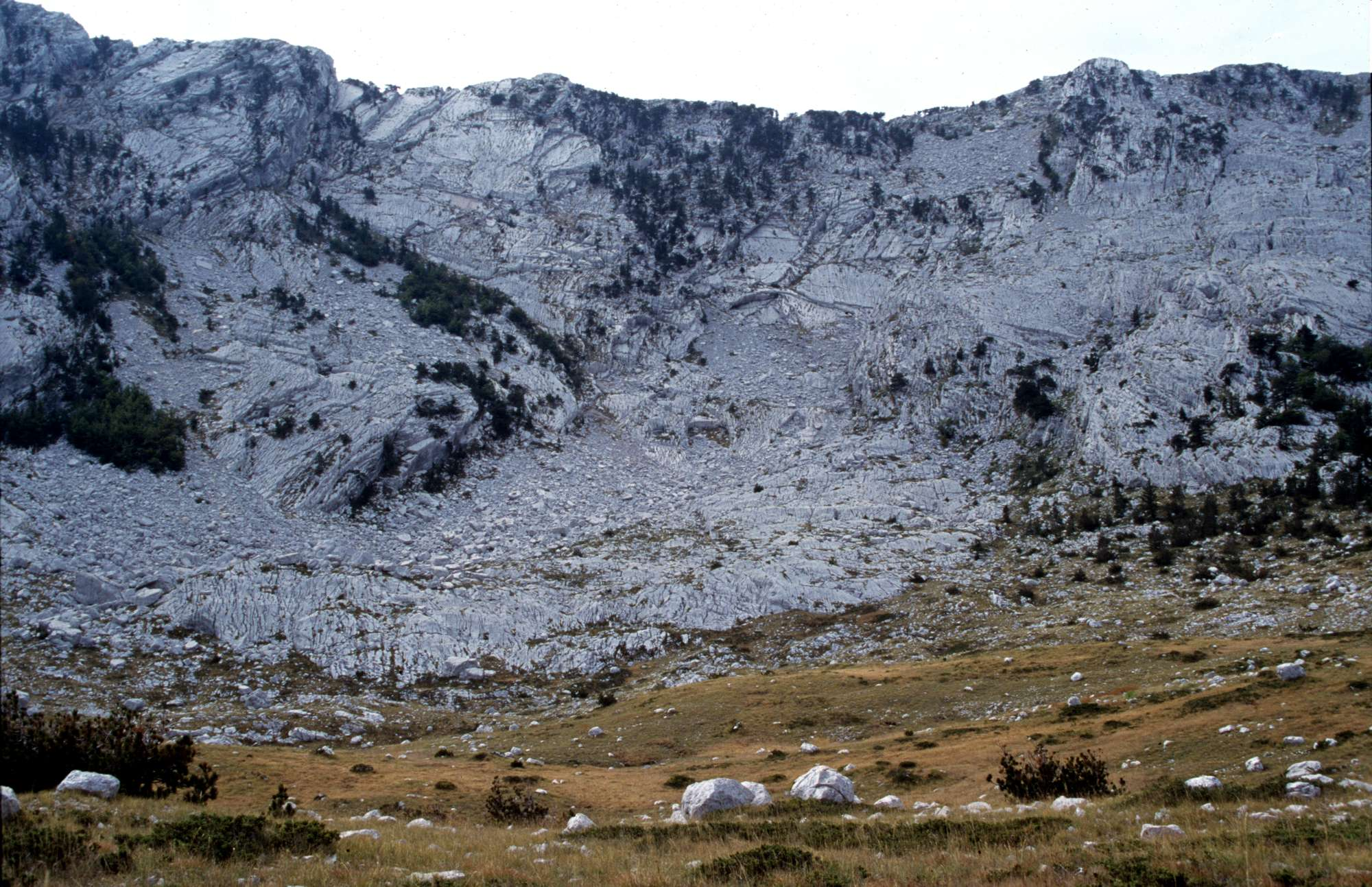 Cirk Borovi do na severu Orjena u Bijeloj gori. Copyright (c) 2002 Pavle Cikovac.